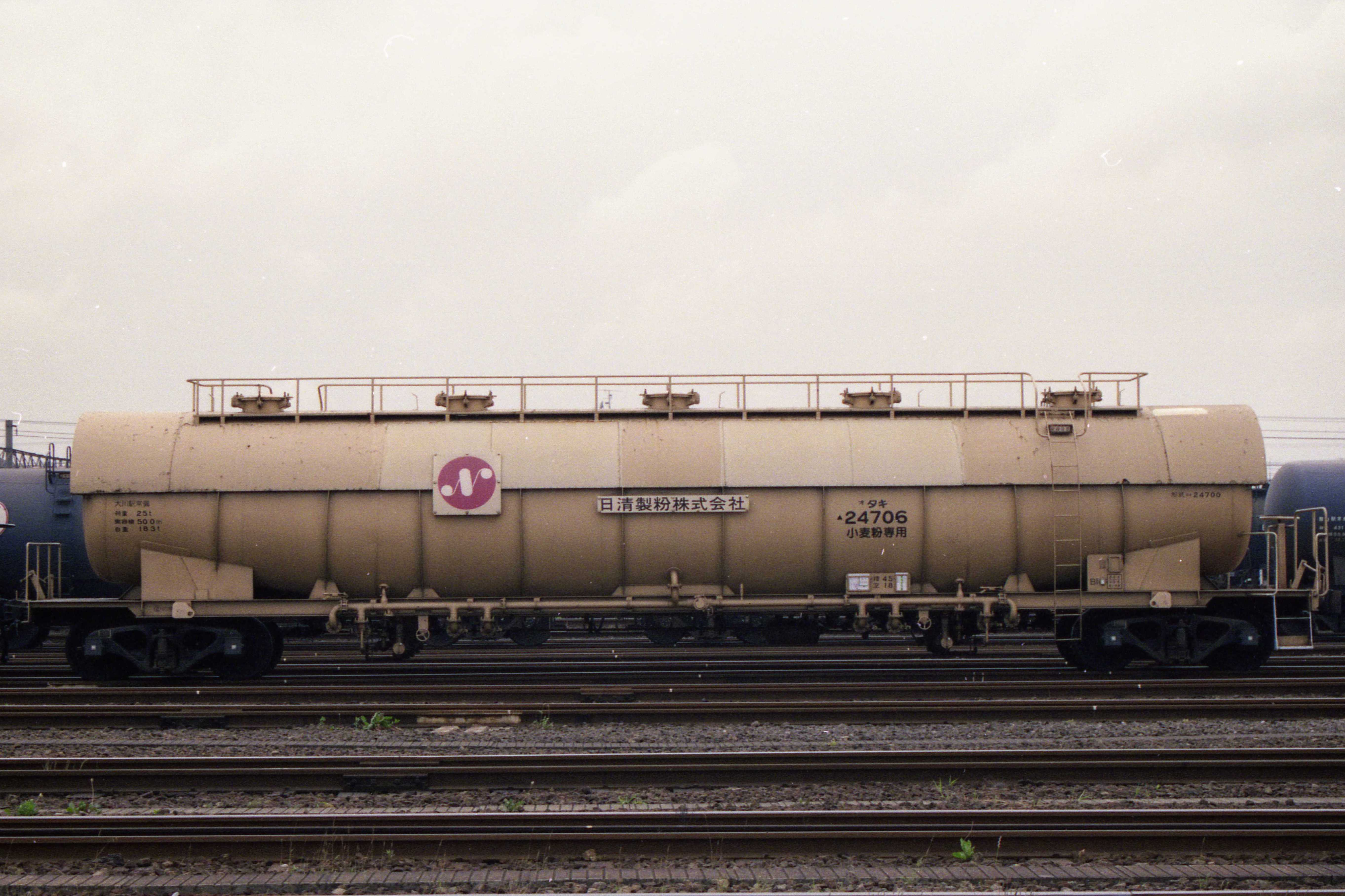 国鉄タキ24700形タキ24706。1994年7月1日、川崎貨物駅にて。